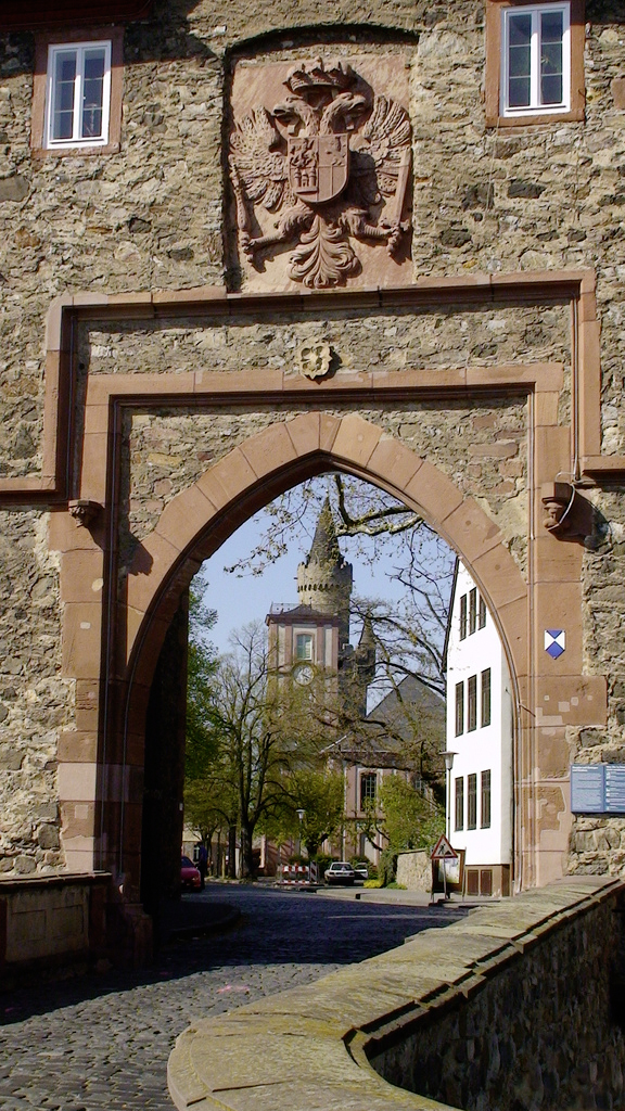 Castle Friedberg, Hessen